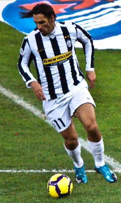 Amauri